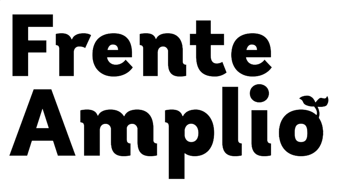 Símbolo del Frente Amplio, coalición política chilena.